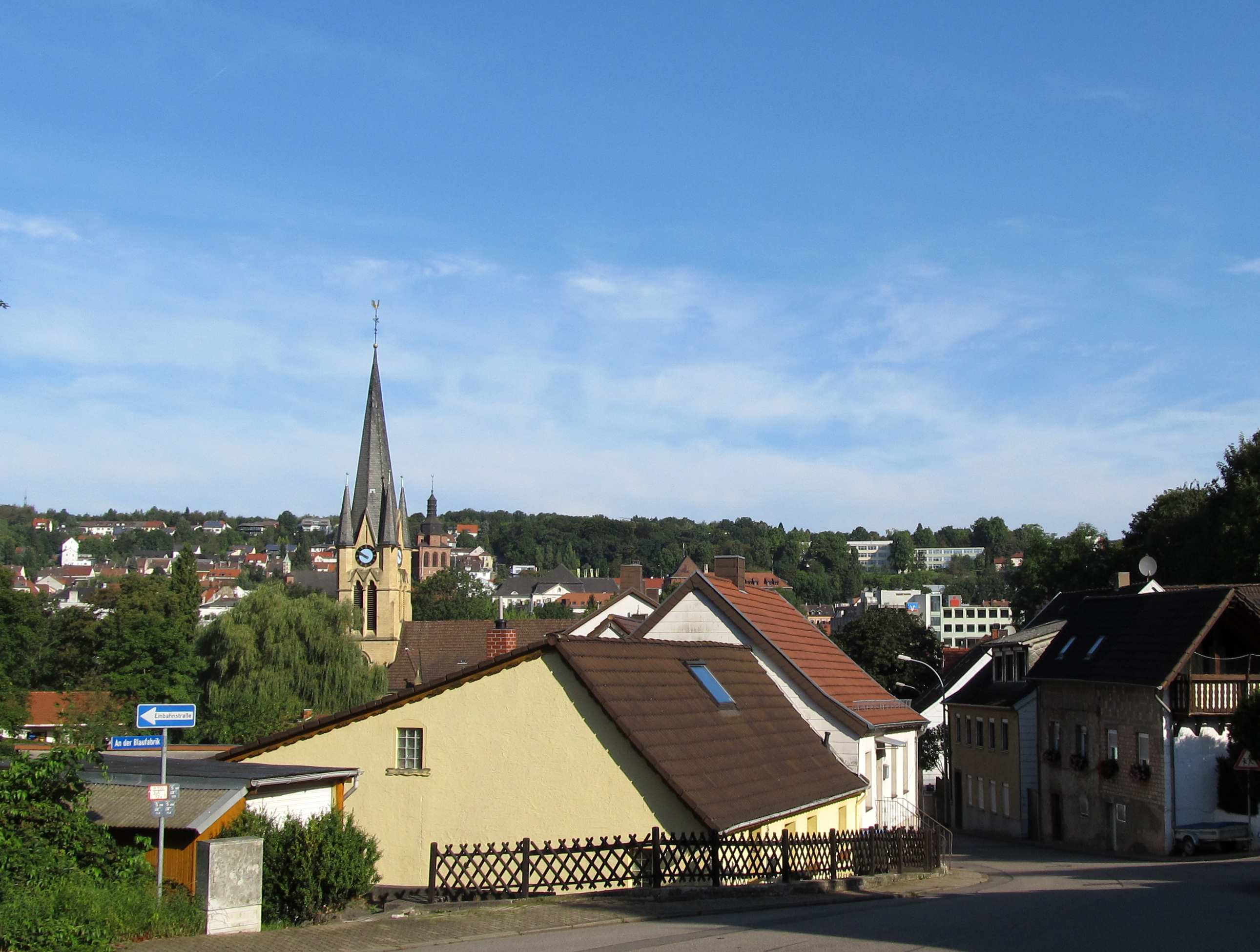 Blick auf Sulzbach, Saarland